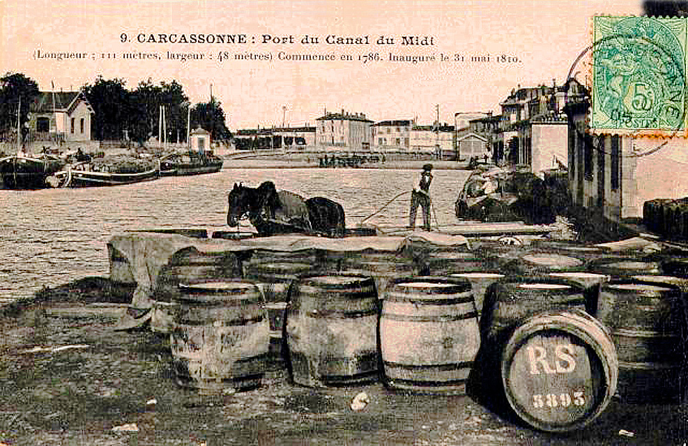 Barriques de vin à Carcassonne sur le port du Canal du Midi